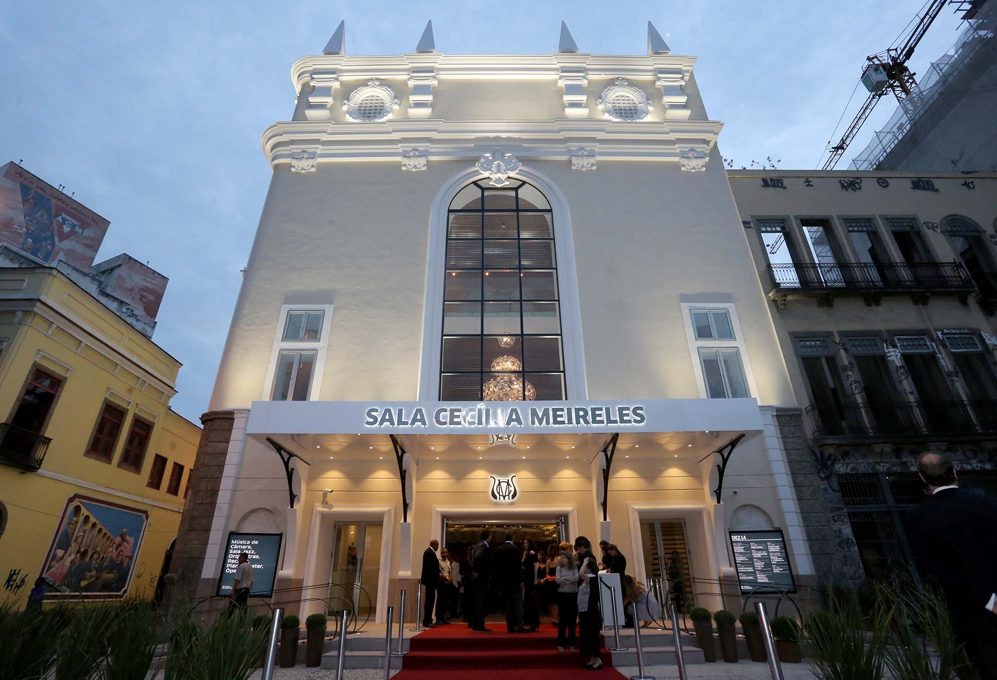 A Sala Cecília Meireles em novembro de 2014.